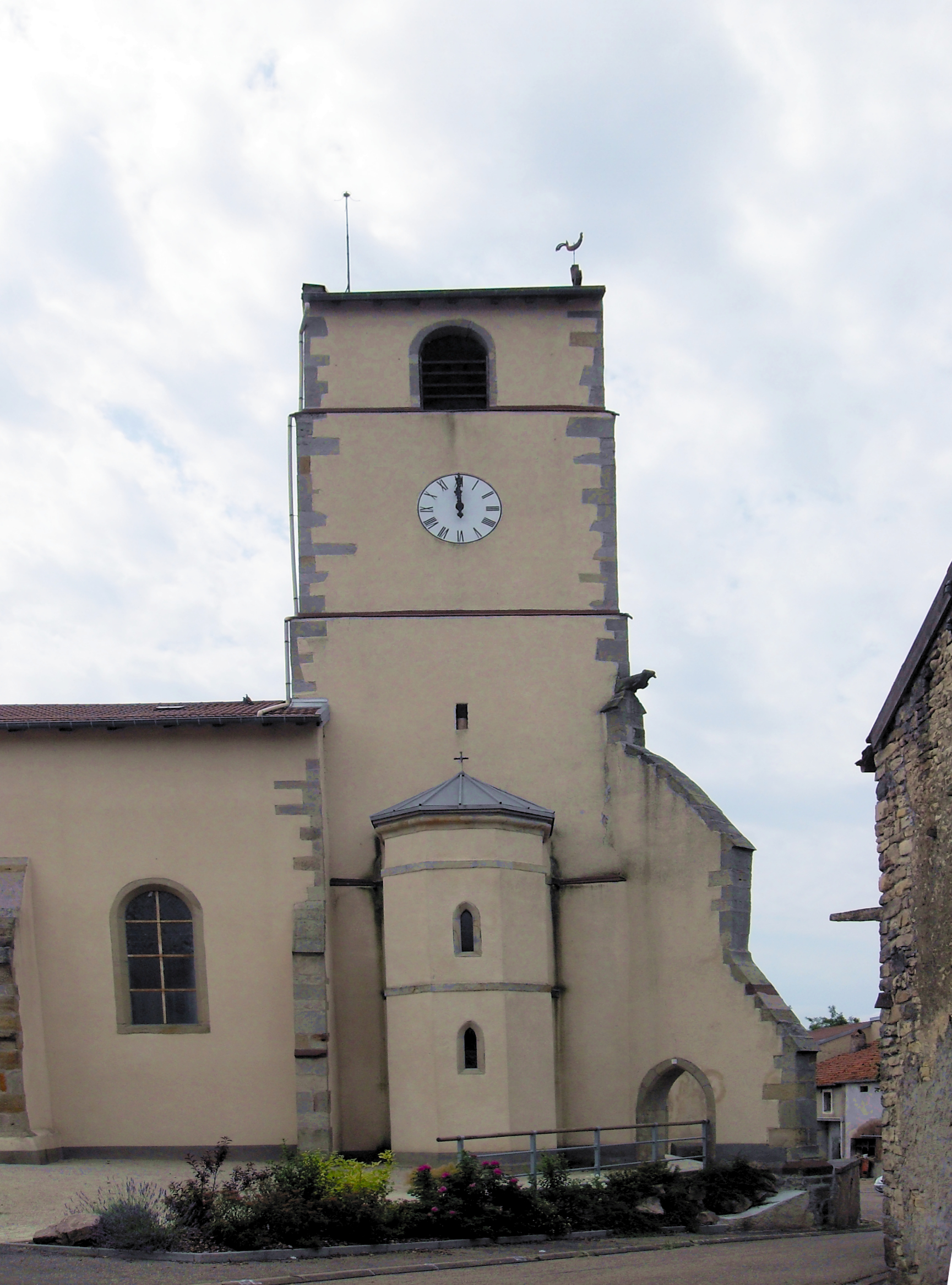 L'église Saint-Èvre à Jorxey